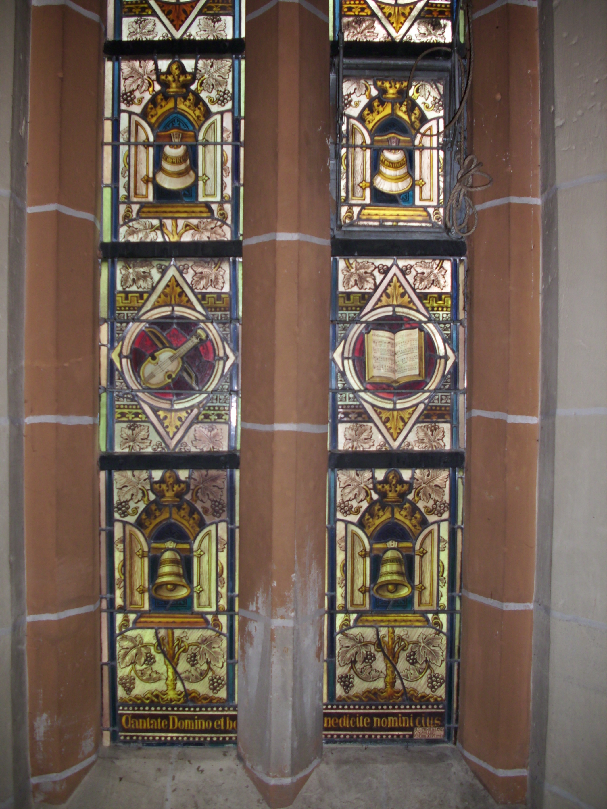 Glockenfenster in St. Cyriakus. Südlicher Treppenaufgang zu den Emporen.